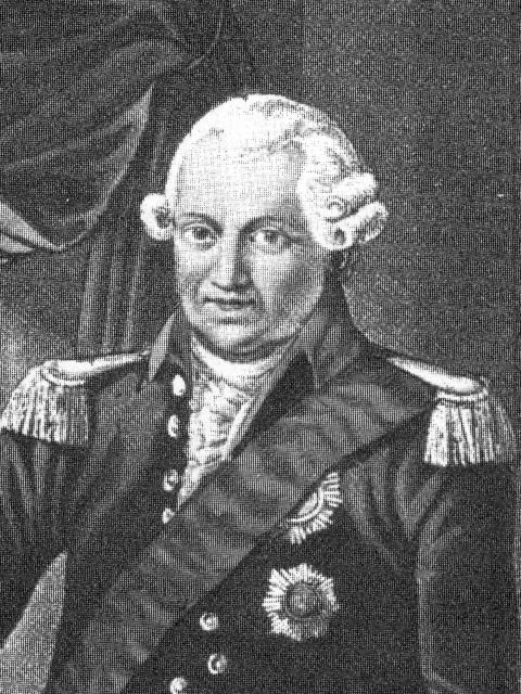 General Friedrich Eugen von Württemberg (1732-1797)